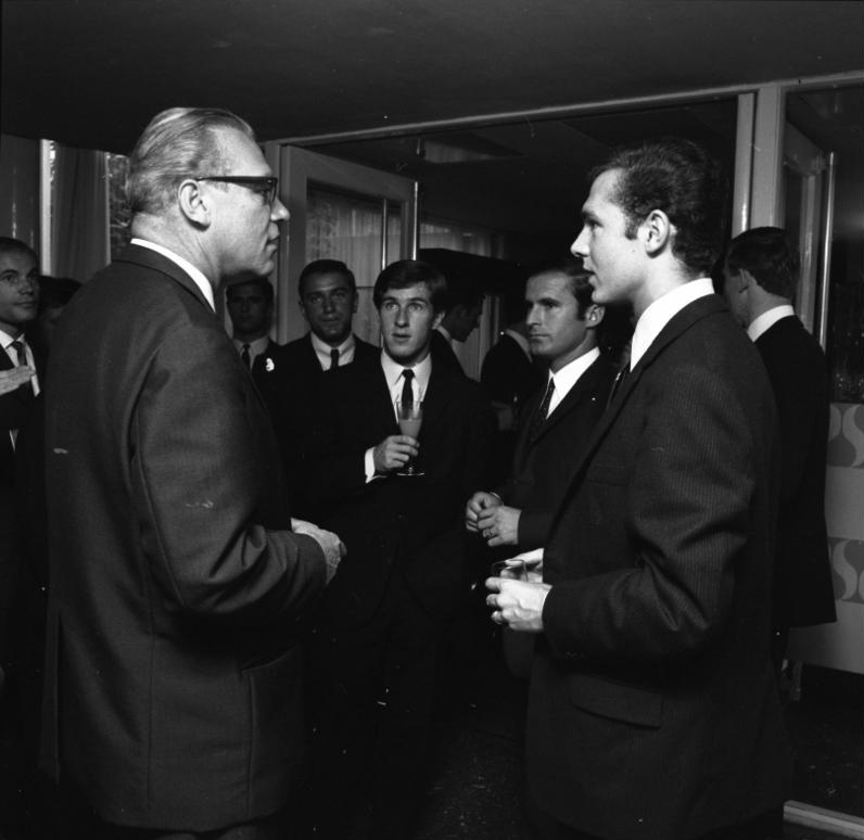 Staatsmin. Heubl Bayer. Landesvertretung empfängt die Fußballmannschaft Bayern-München (Europa-Cup-Sieger)